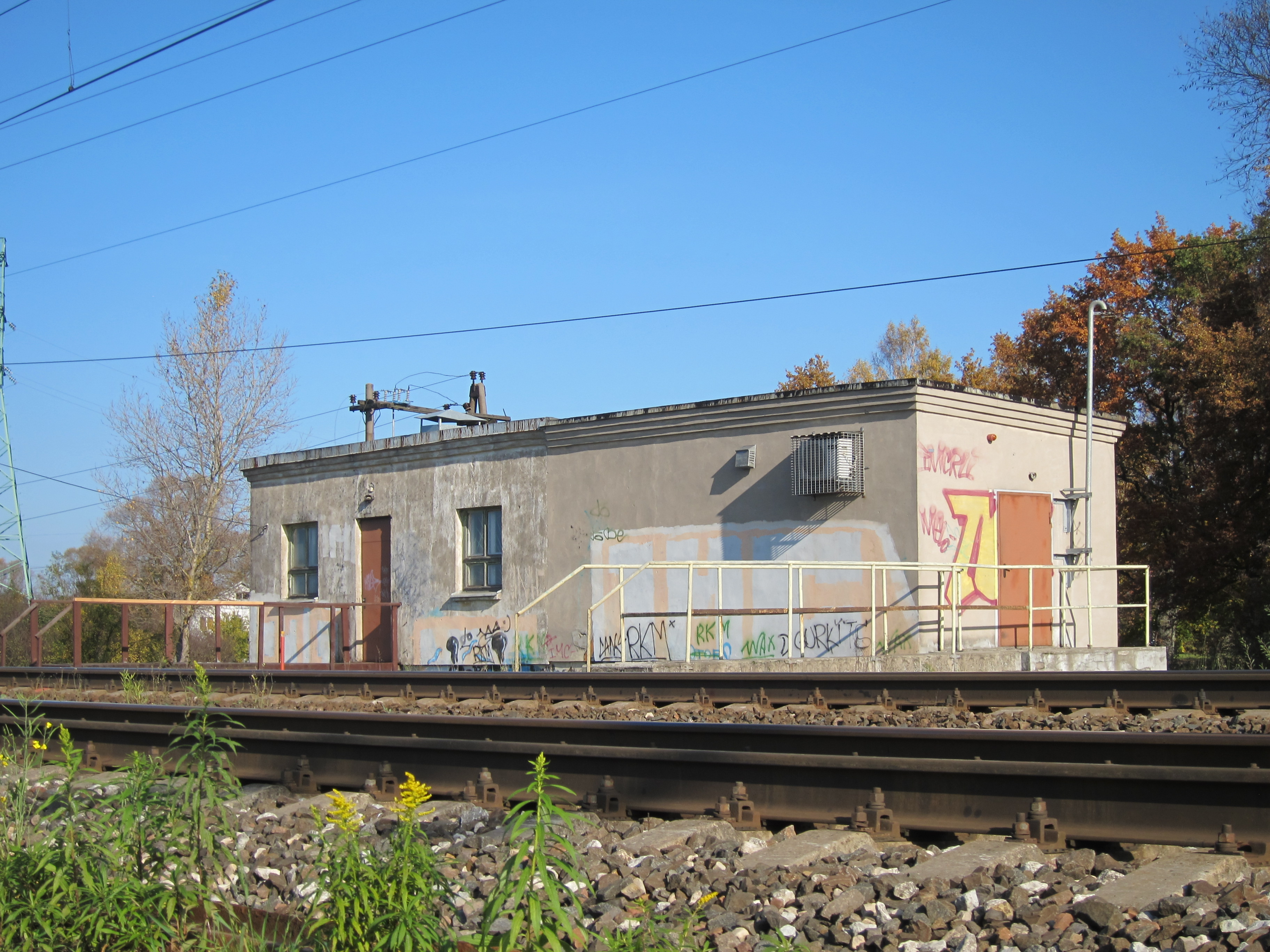 8. kilometra ceļa posteņa ēka